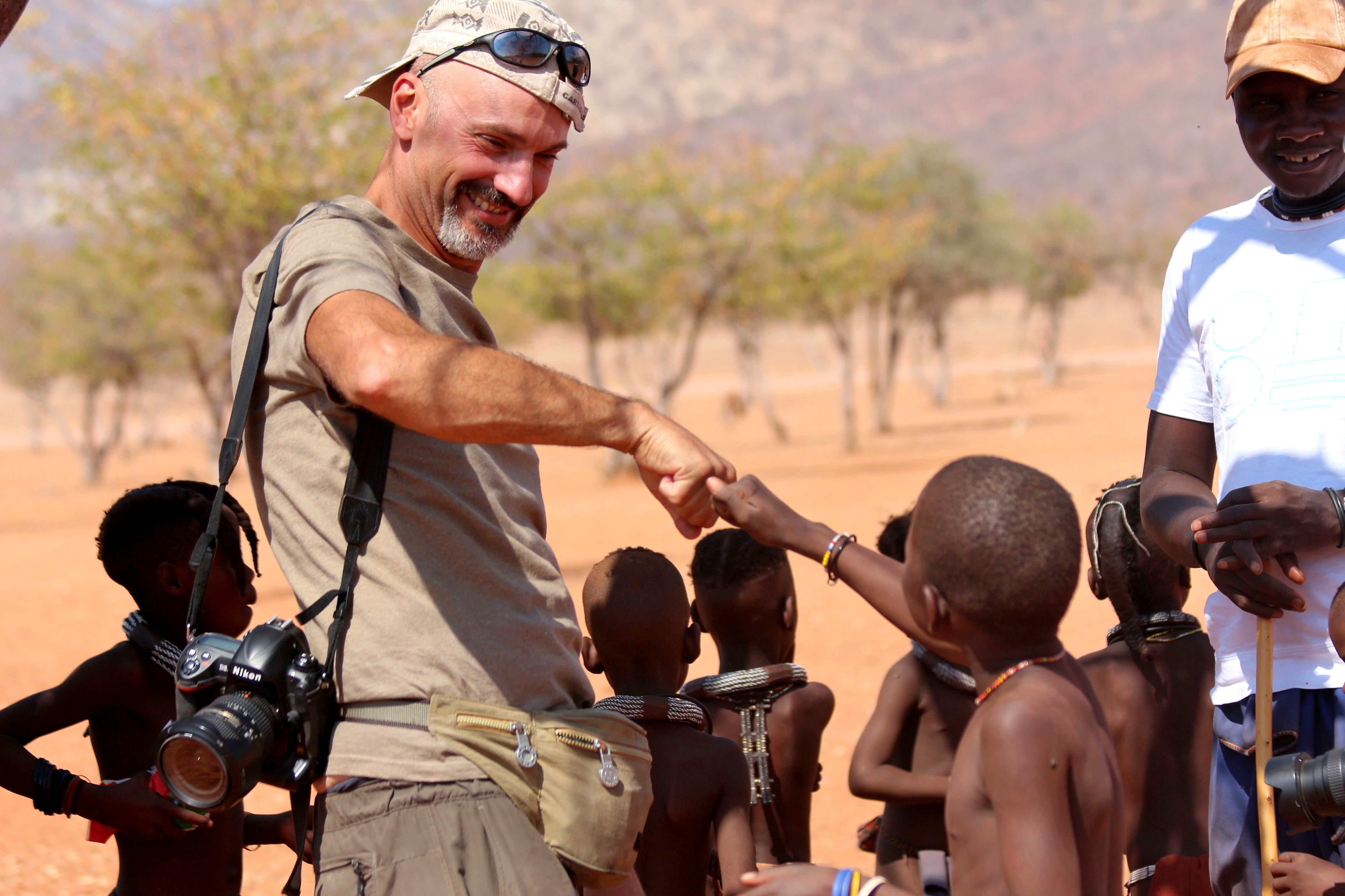 Davide Pianezze Namibia